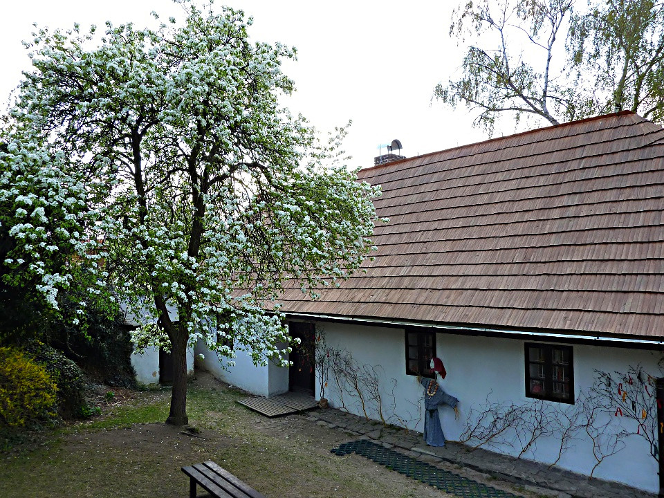 Příbram VI-Březové Hory, Havířská čp. 105, hornický domek.